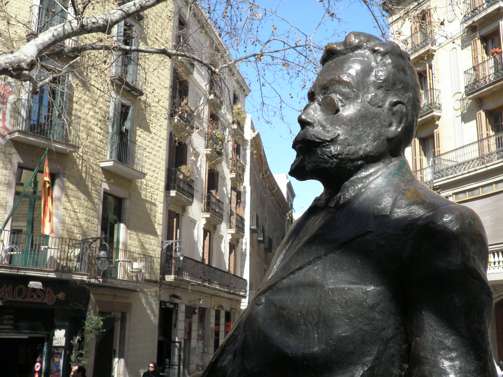 Àngel Guimerà. Escultura a la Plaça Sant Josep Oriol (Ciutat Vella, Barcelona). Obra de Josep Cardona Furro realitzada per Codina Corona 1982.